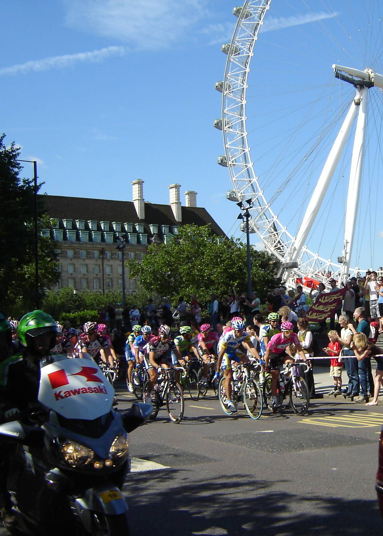 2007 Tour de France, behind Jubilee gardens